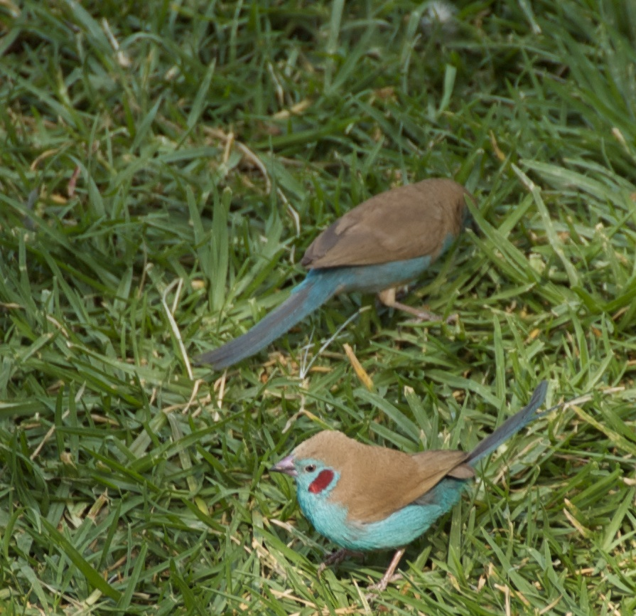 Ethiopia, 2007.